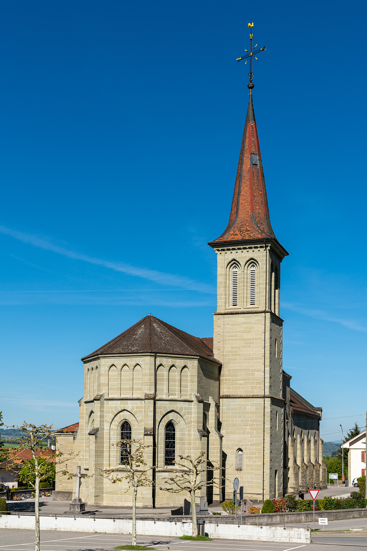 Kirce Saint Maurice (1862-68) mitten in Ursy (FR)